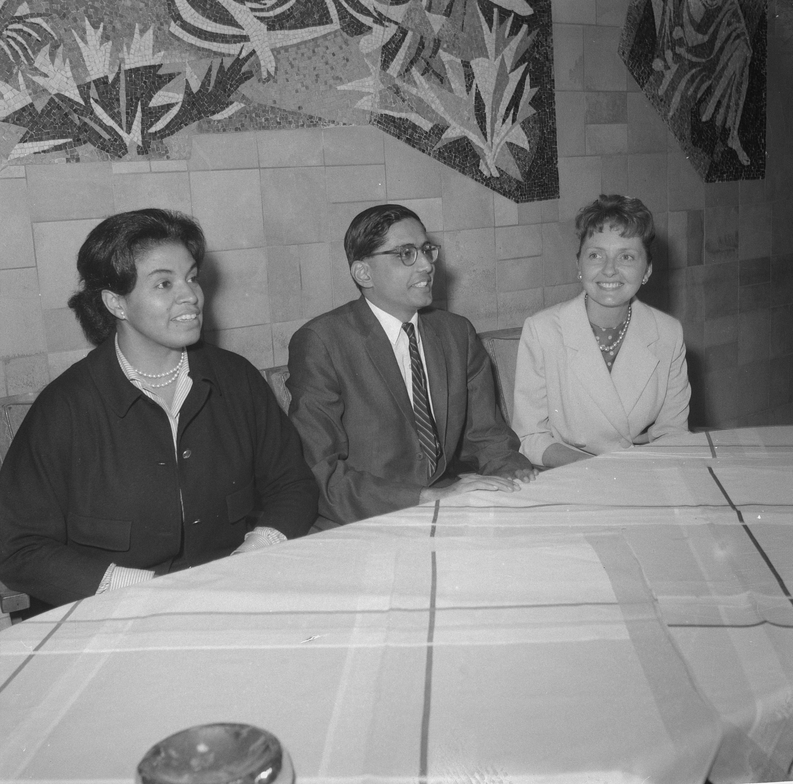 Collectie / Archief : Fotocollectie Anefo Reportage / Serie : [ onbekend ] Beschrijving : Aankomst van Muriel Smith , Rajmaham Ghandi en Ann Buckles op Schiphol Datum : 11 juli 1960 Trefwoorden : aankomsten Persoonsnaam : Ann Buckles, Muriel Smith, Rajmaham Ghandi Fotograaf : Pot, Harry / Anefo Auteursrechthebbende : Nationaal Archief Materiaalsoort : Negatief (zwart/wit) Nummer archiefinventaris : bekijk toegang 2.24.01.03 Bestanddeelnummer : 911-4156